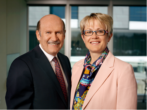 Nancy Knowlton and her husband David Martin